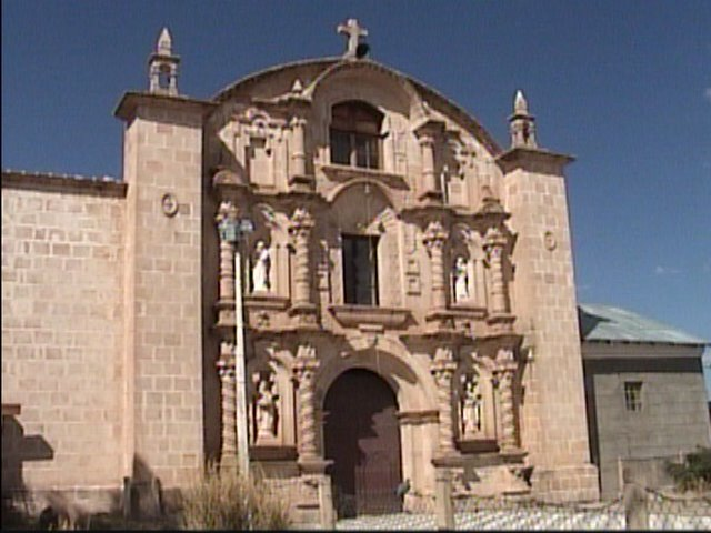 Templo de Oro de Azángaro